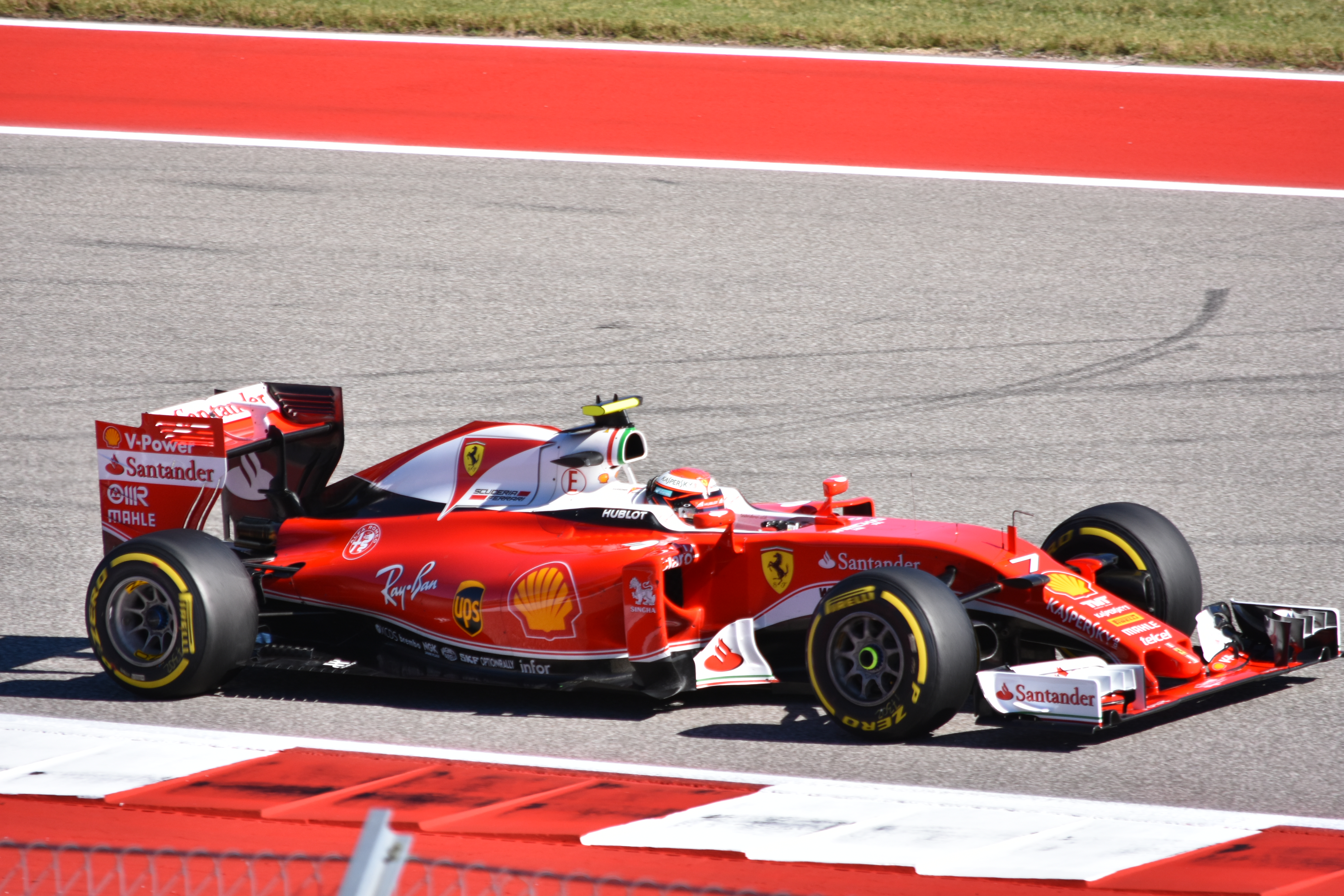 Kimi Raikkonnen, FP1 USA GP 2016